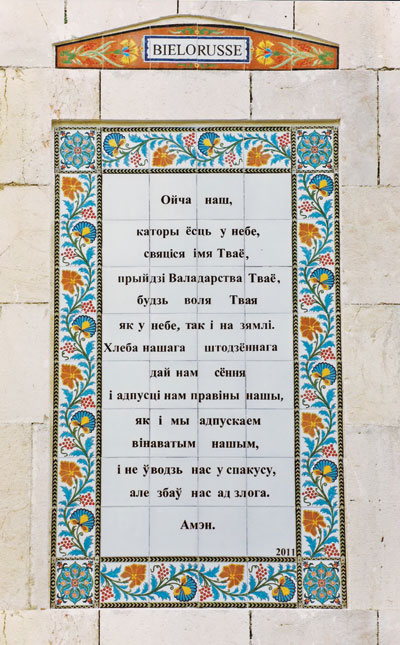 дошка з малітвай «Ойча наш» на беларускай мове ў Іерусаліме